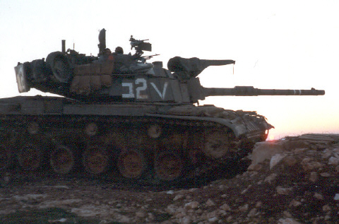 מג"ח 6מ. אני צילמתי אי שם ואי פעם.